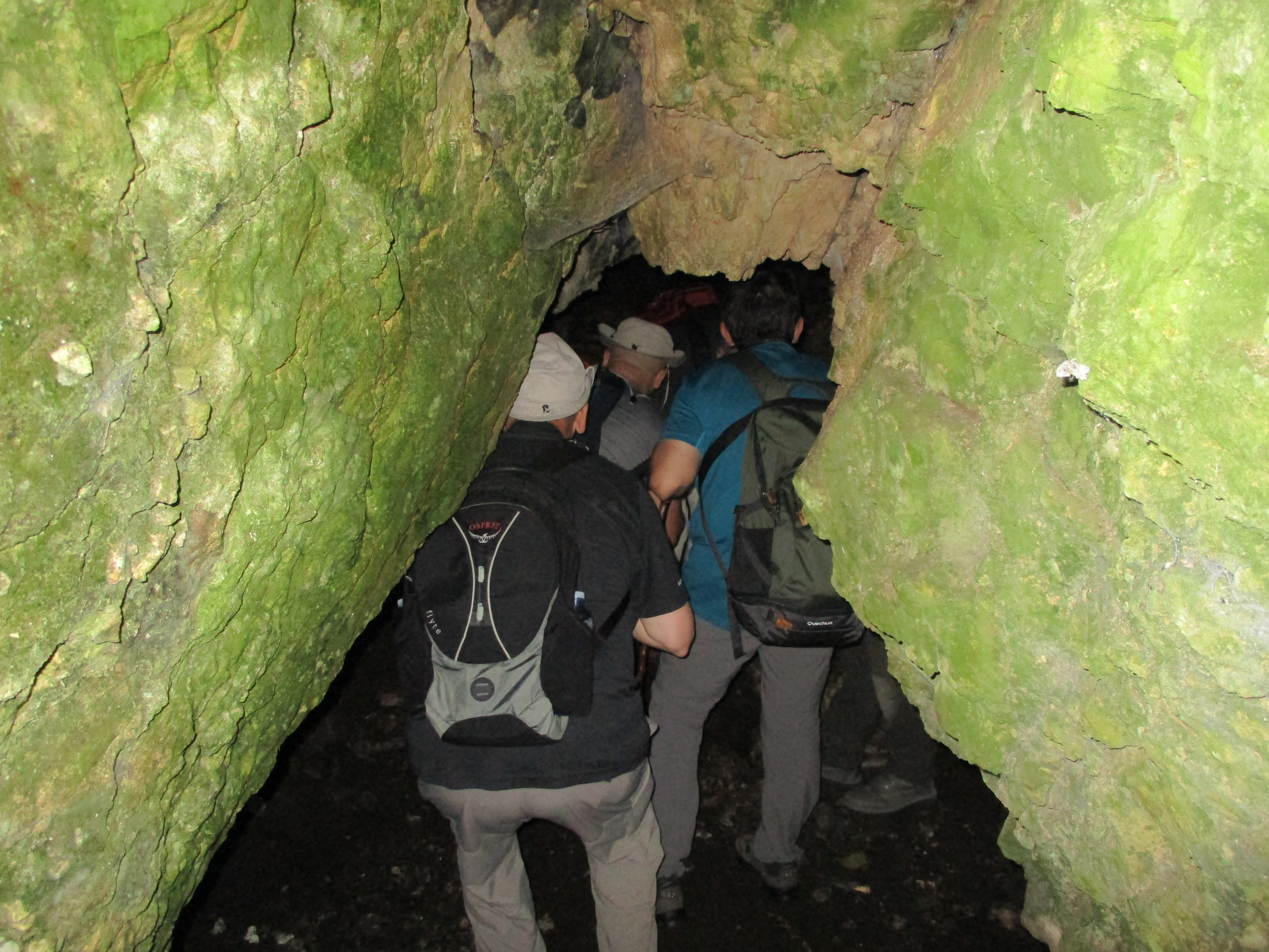 Visita guidata in grotta